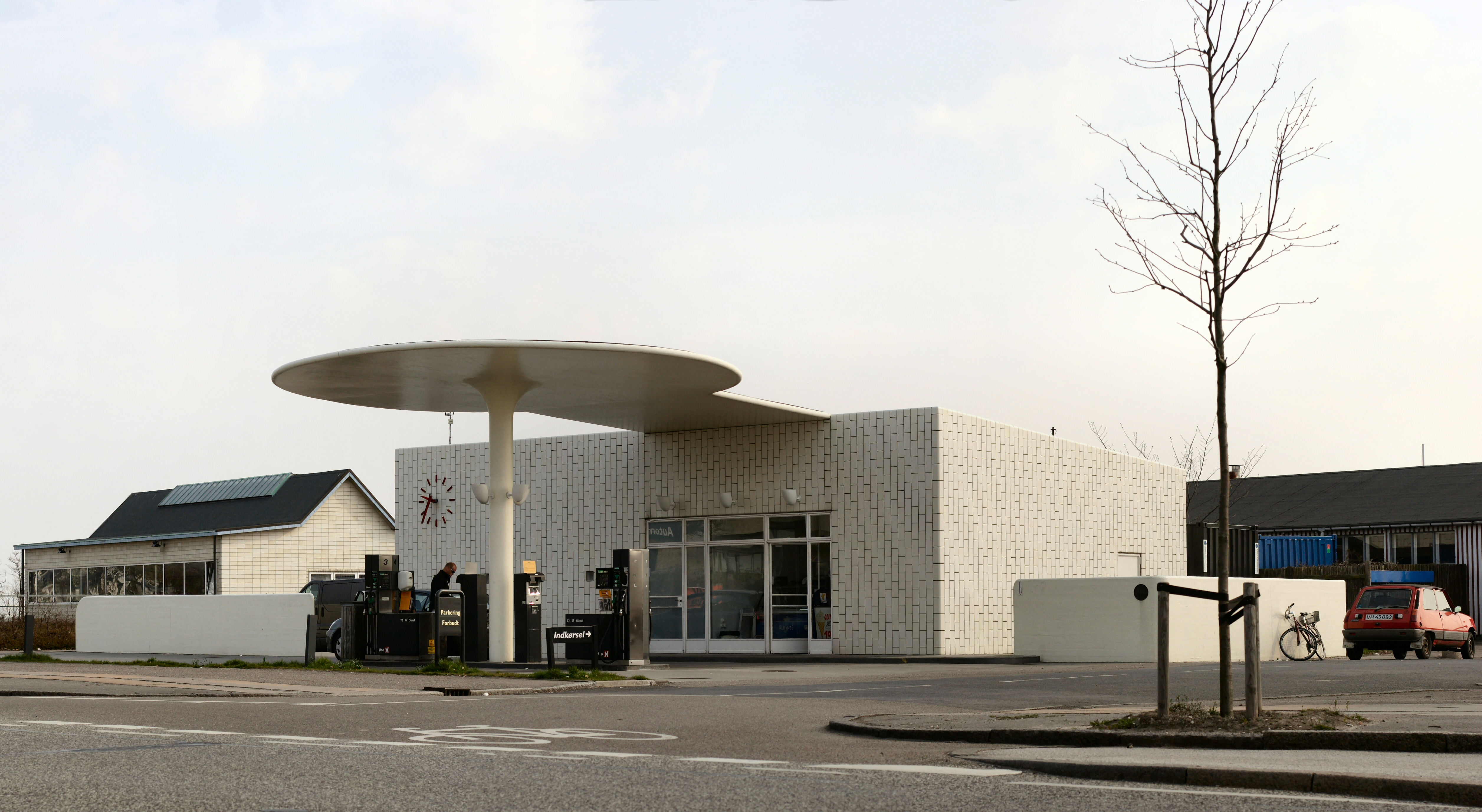 Tankstation tegnet af Arne Jacobsen, Skovshoved